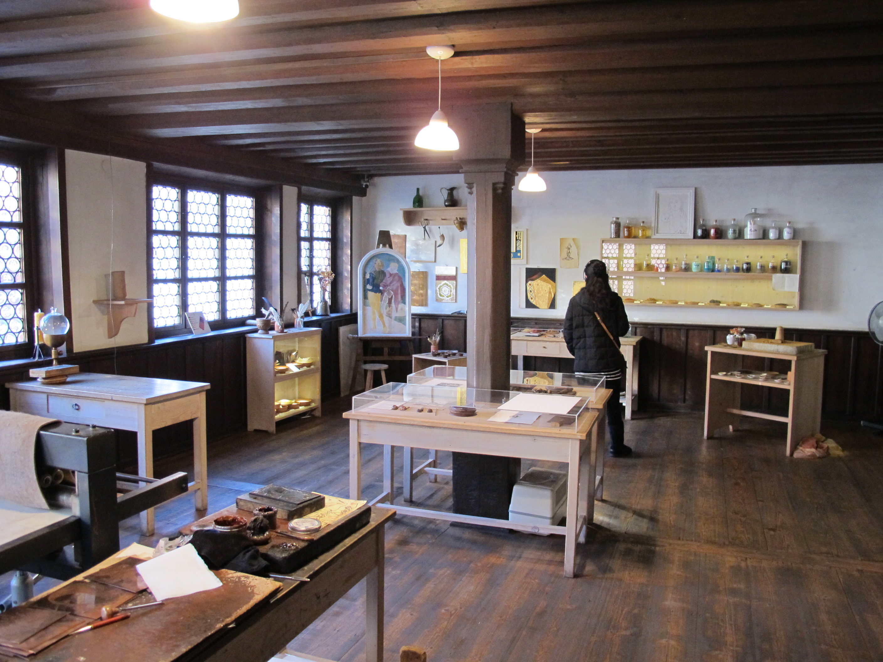 Albrecht-Dürer-Haus, interno 08 workshop